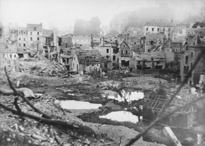 Normandie Front [1944] St. Lô. Ein schwerbeschädigtes Stadtviertel.